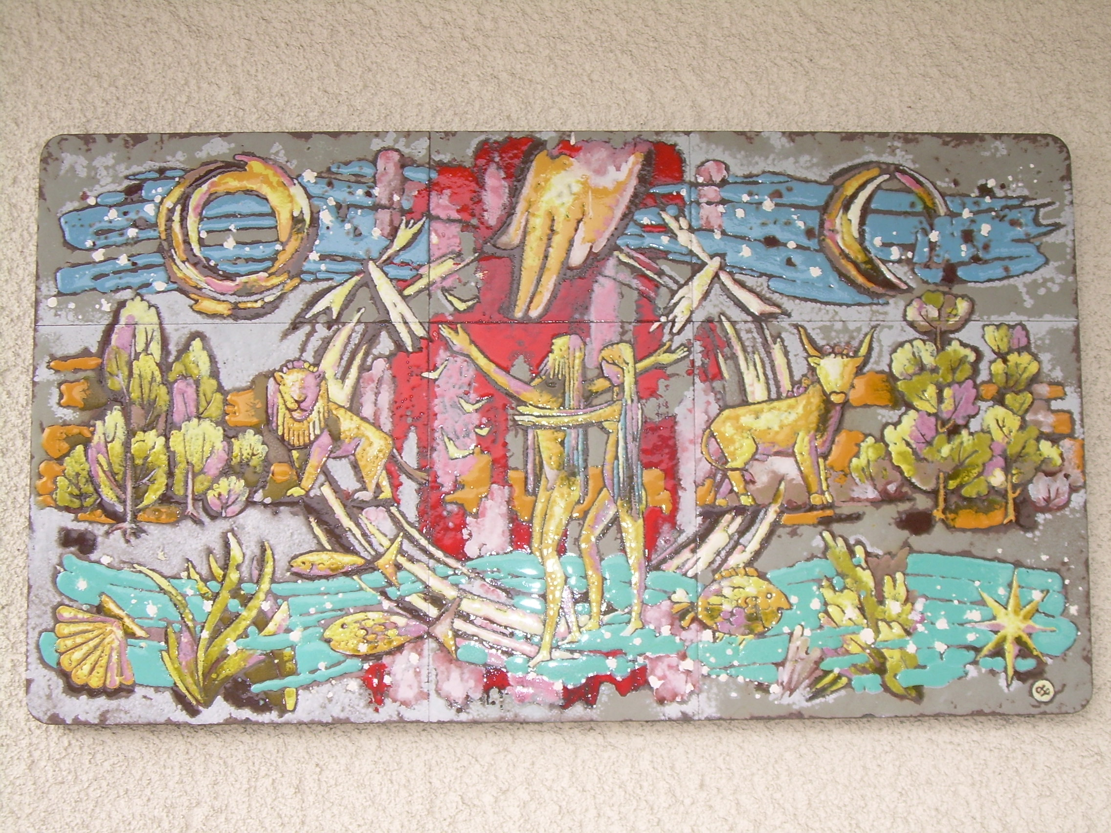 Tapisserie christologique église Saint-Victor d'Ollon